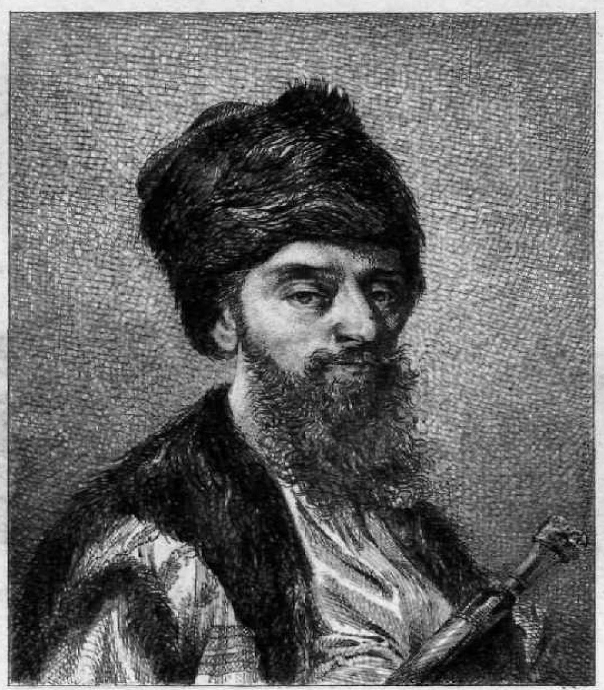 Griechischer Fürst von Moldavien, 19. Jahrhundert